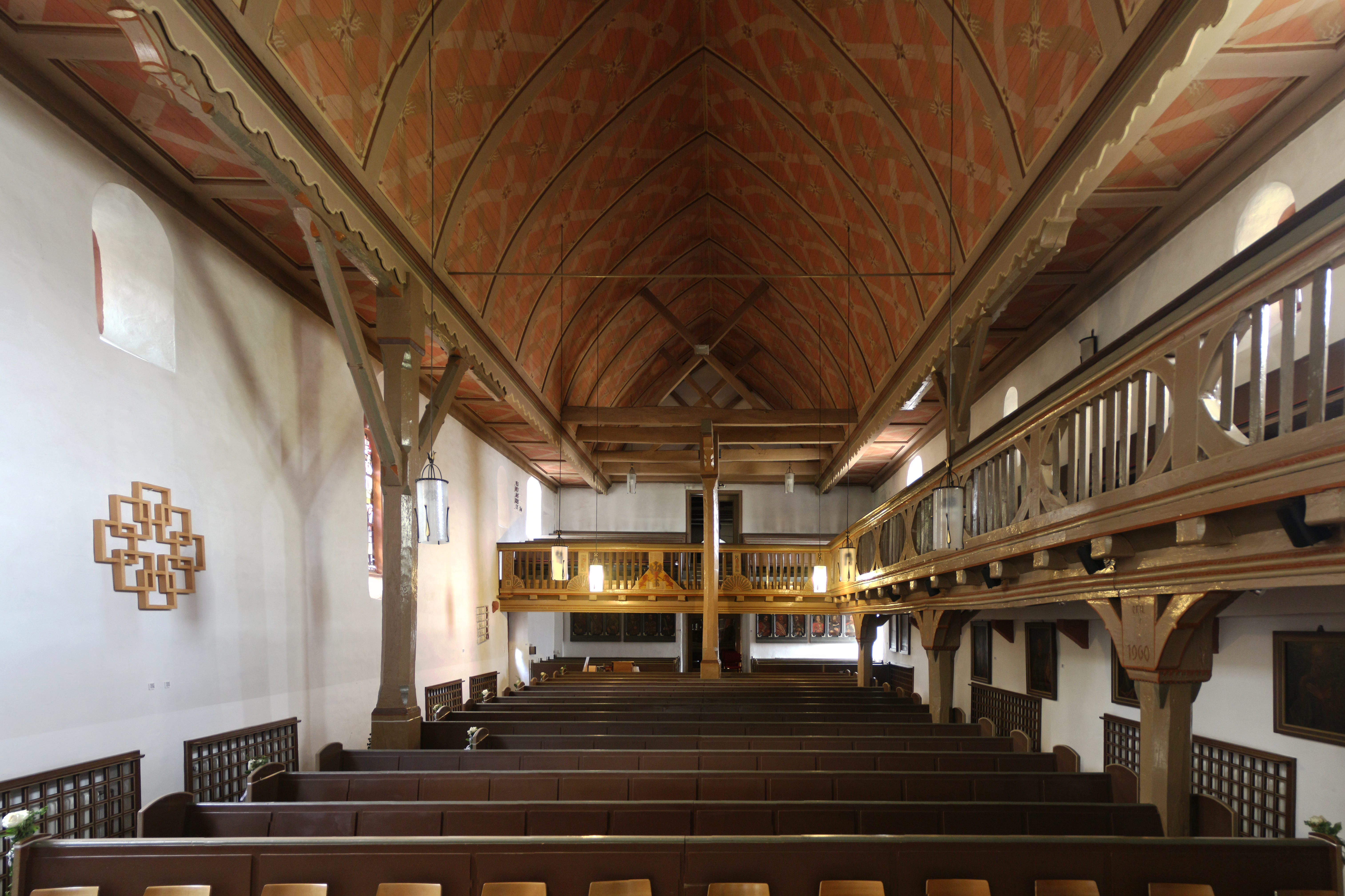 Martinskirche (Dautphe)